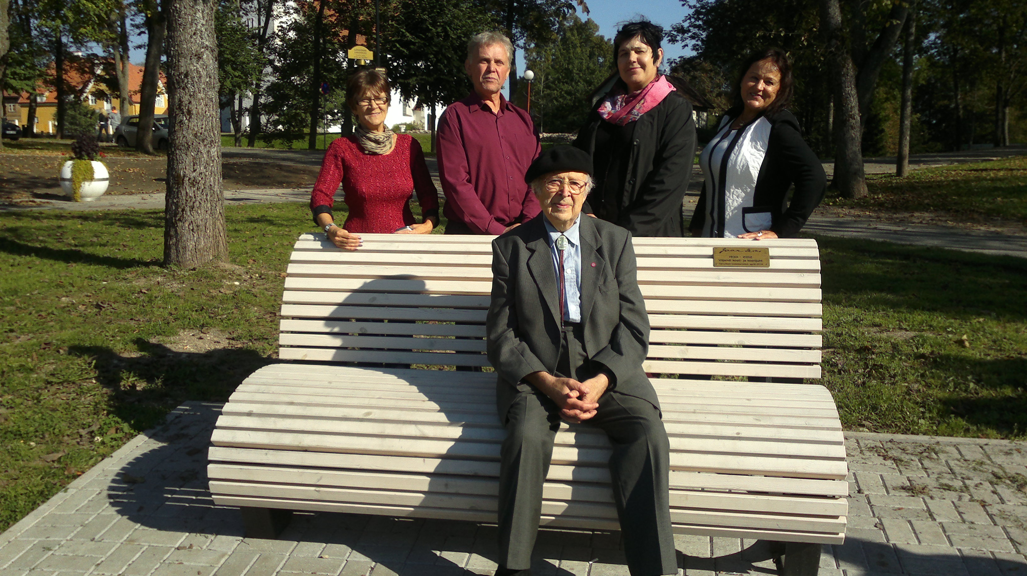 2014. aastal möödus 40 aastat, kui Kalju Lillepuu õpilased lõpetasid Viljandi Kultuurikooli. Sel puhul koguneti Viljandisse, et seda sündmust tähistada. Käidi tuttavais paigus, ka lossimägedes, istuti lauas. Oli 20. september 2014.